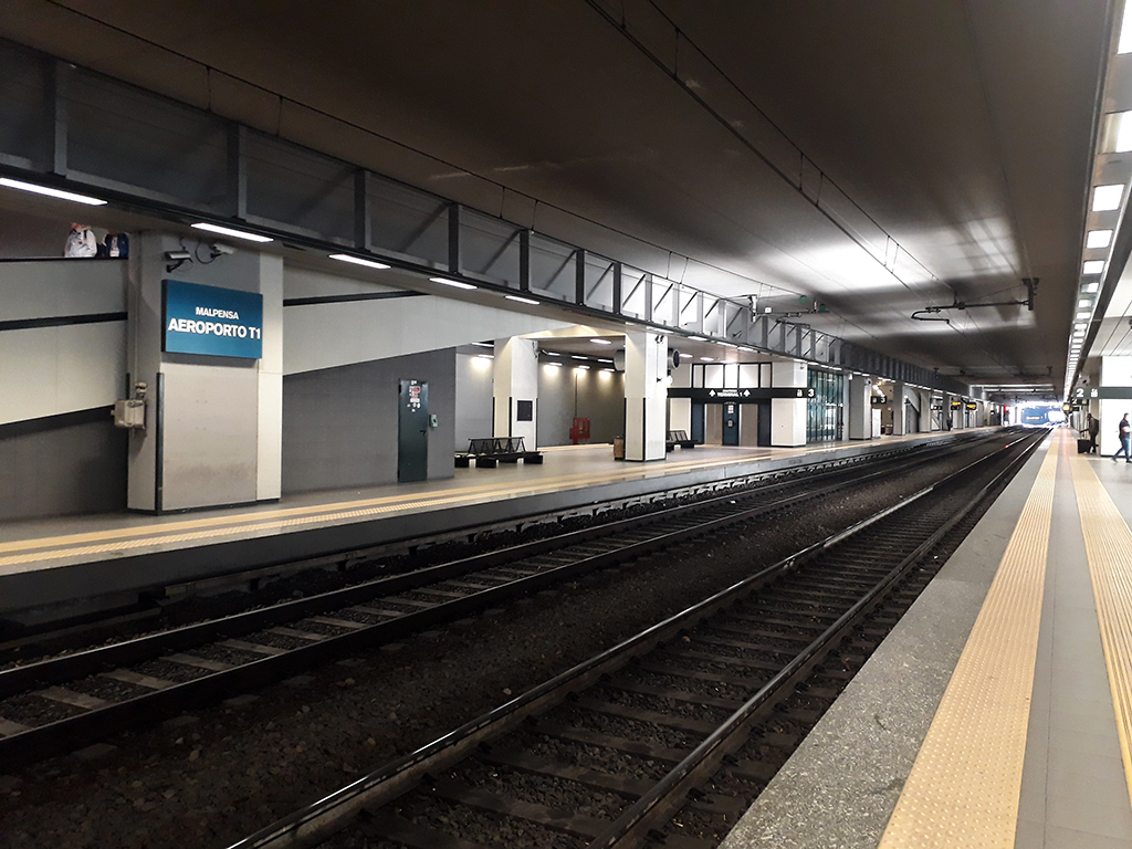 Stazione di Malpensa Aeroporto T1, il piazzale binari.